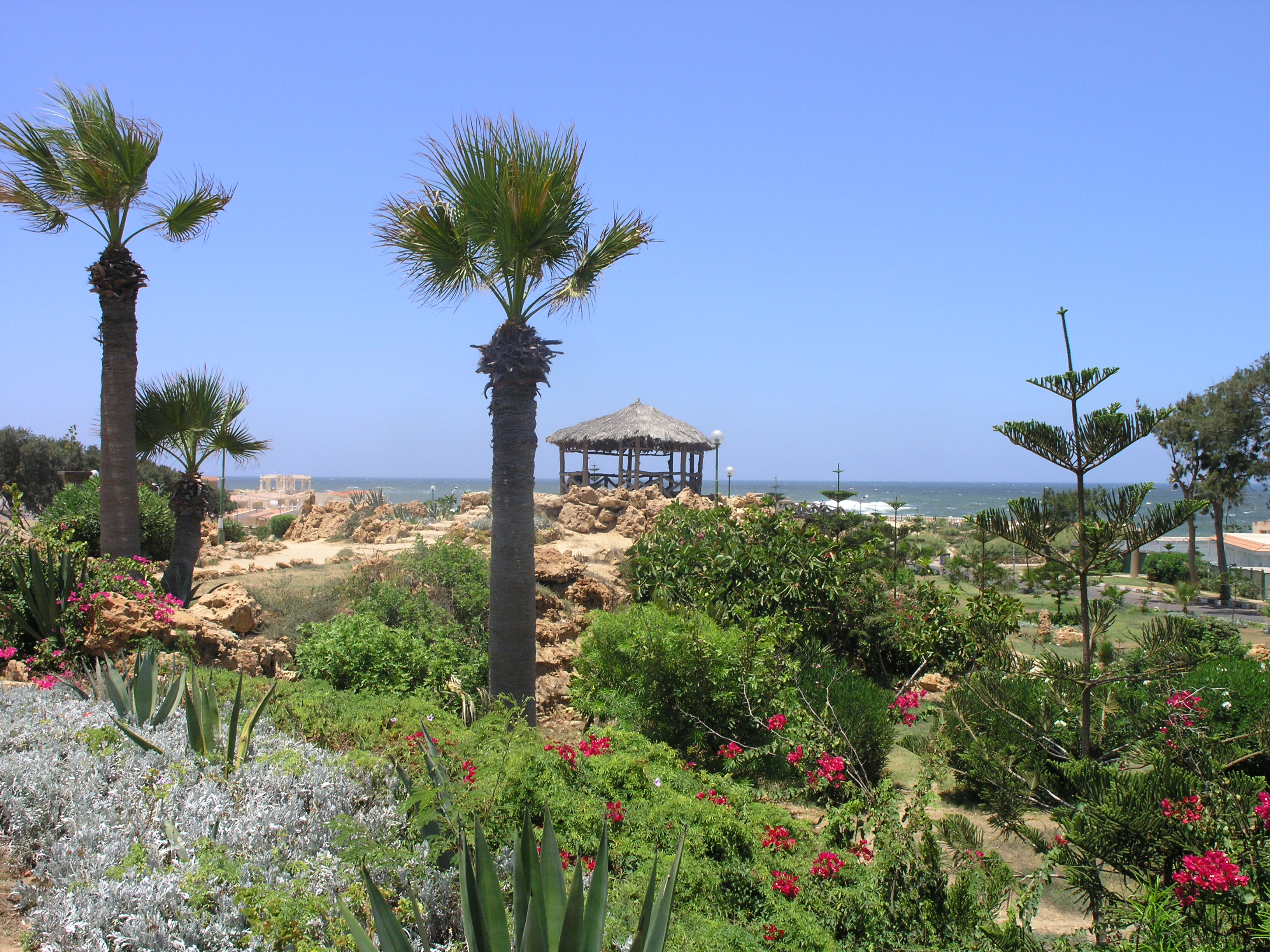 Alexandria - Montaza Palace garden